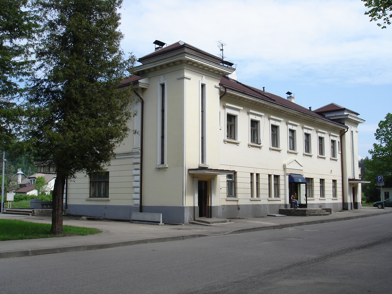 Здание станции Кегумс